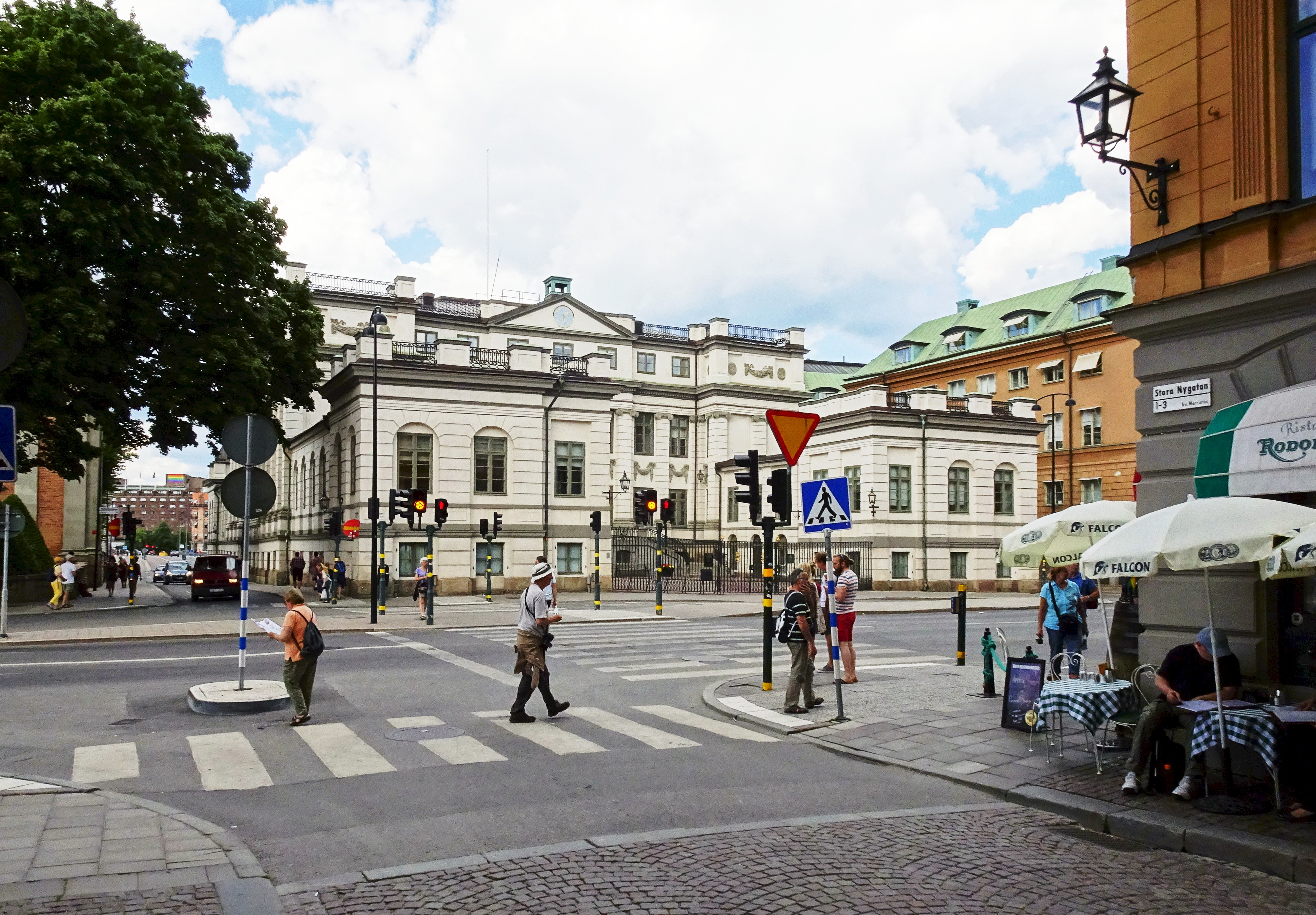 Riddarhustorget med Bondeska palatset från Stora Nygatan 1